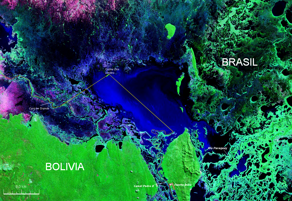 Mapa Satelital con descripción de la zona de la Laguna Uberaba situada entre Bolivia y Brasil hecha a partir de una Imagen de la Nasa * Desde : Original